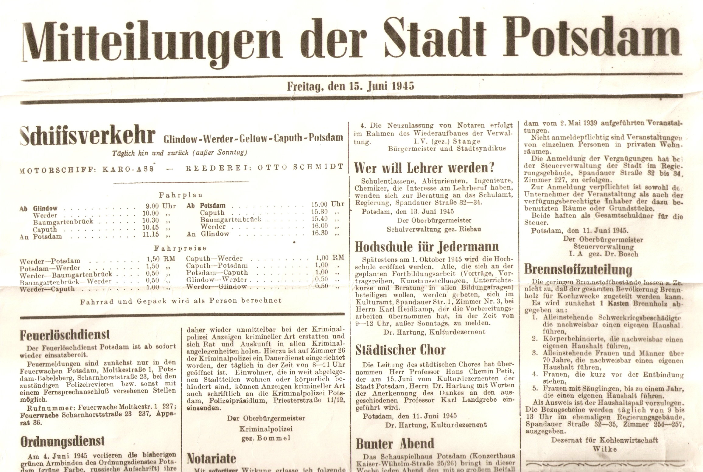 Bekanntmachung der Stadt Potsdam über Schiffsverkehr zwischen Potsdam und Werder (Fahrplan)